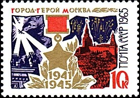 Moscou, ville héroïque